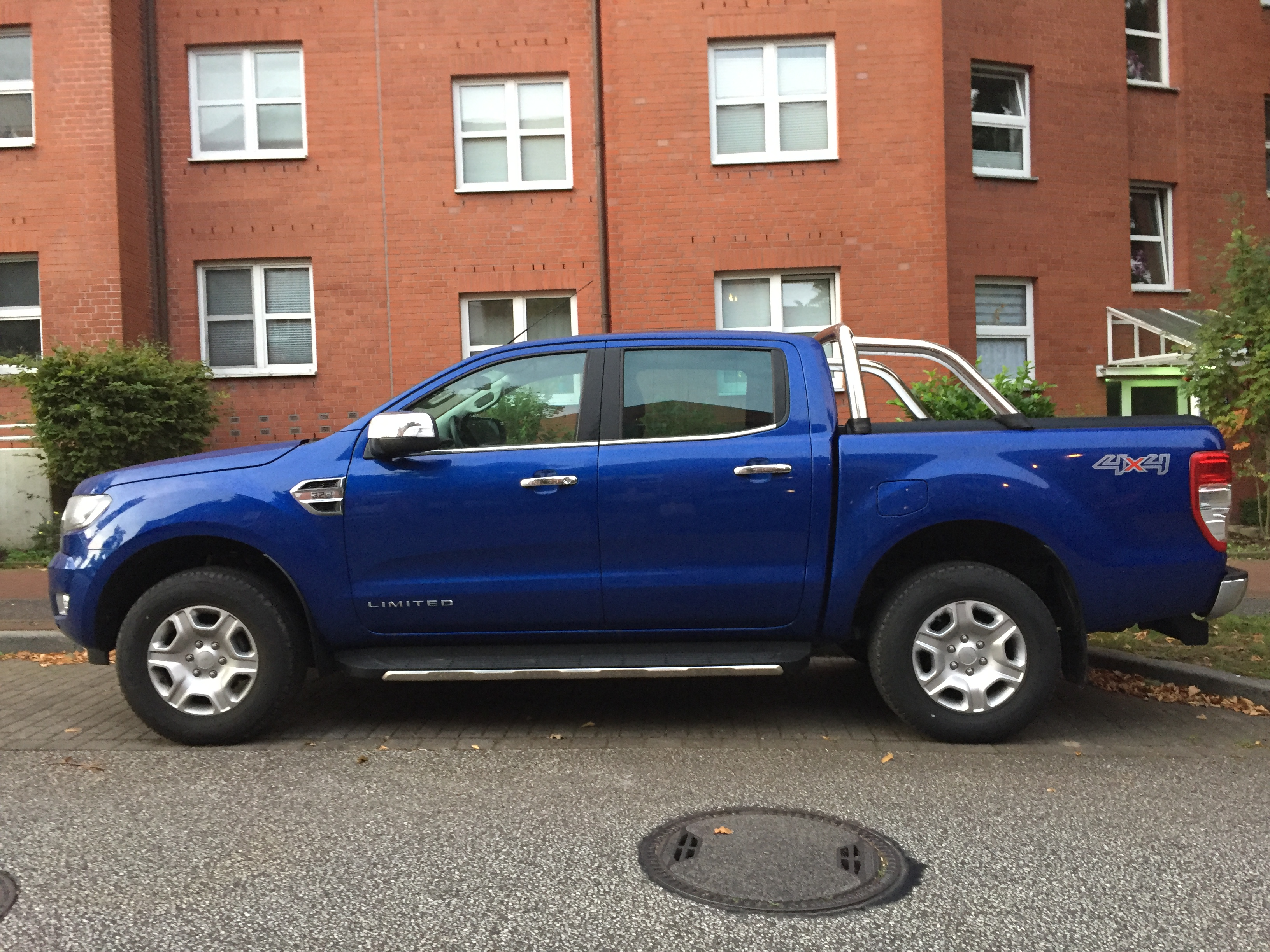 Ford Ranger "Limited" Seitenansicht